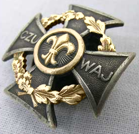 Krzyż Harcerski noszony przez osoby posiadające stopnień harcerski Harcerz Rzeczypospolitej bądź Harcerka Rzeczypospolitej.